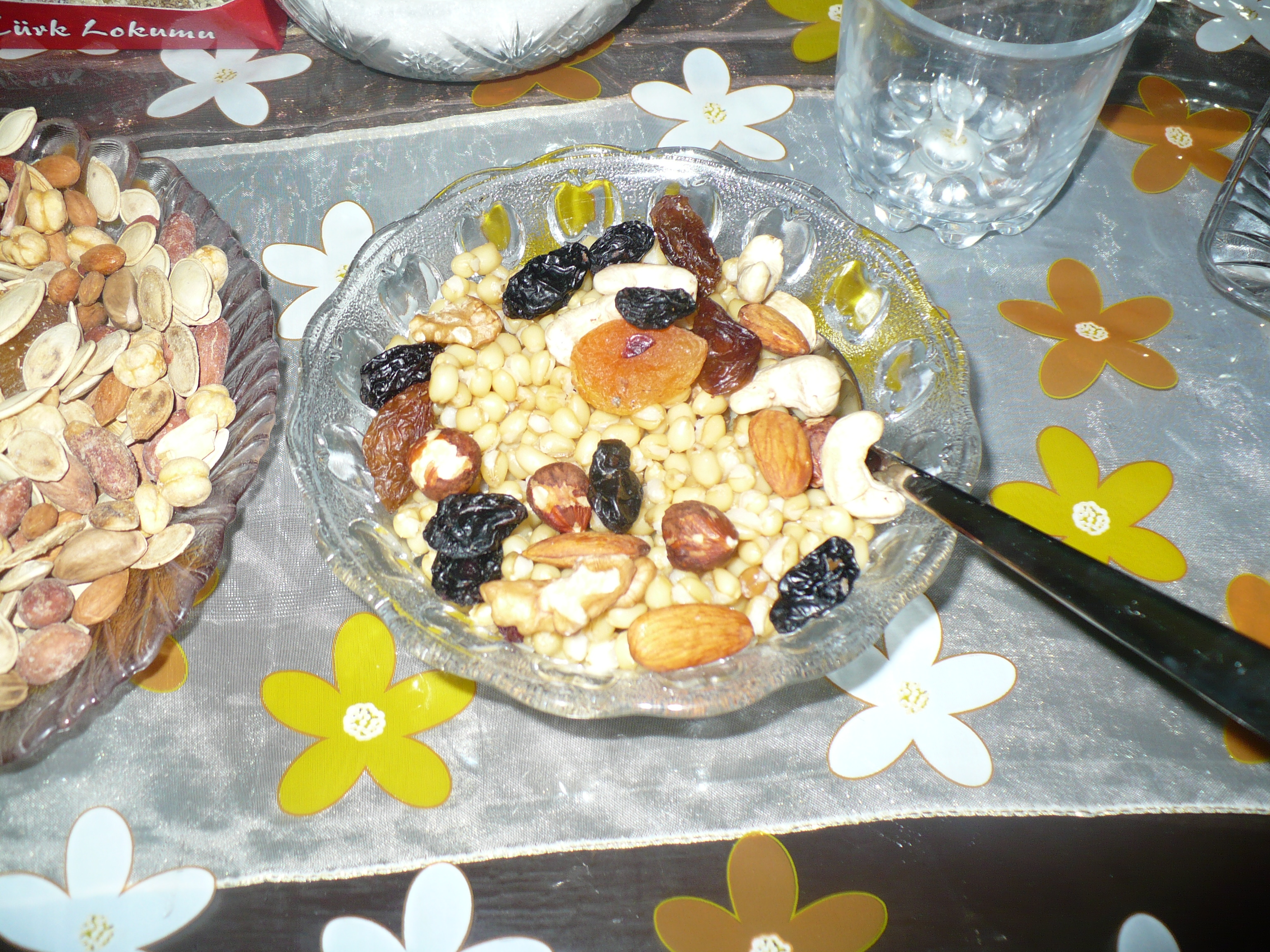 Hedik yemeği